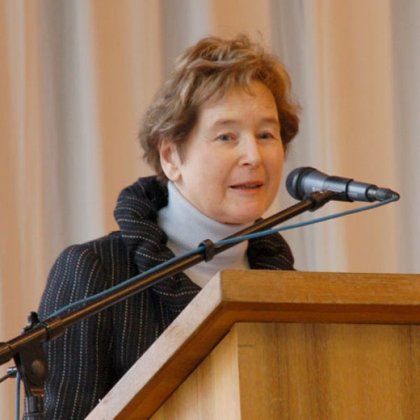 Elisabeth Kopp bei ihrer Festrede "Frauen in der Politik" am 50. Jahrestag der ersten Frauenabstimmung der Schweiz, in Unterbäch